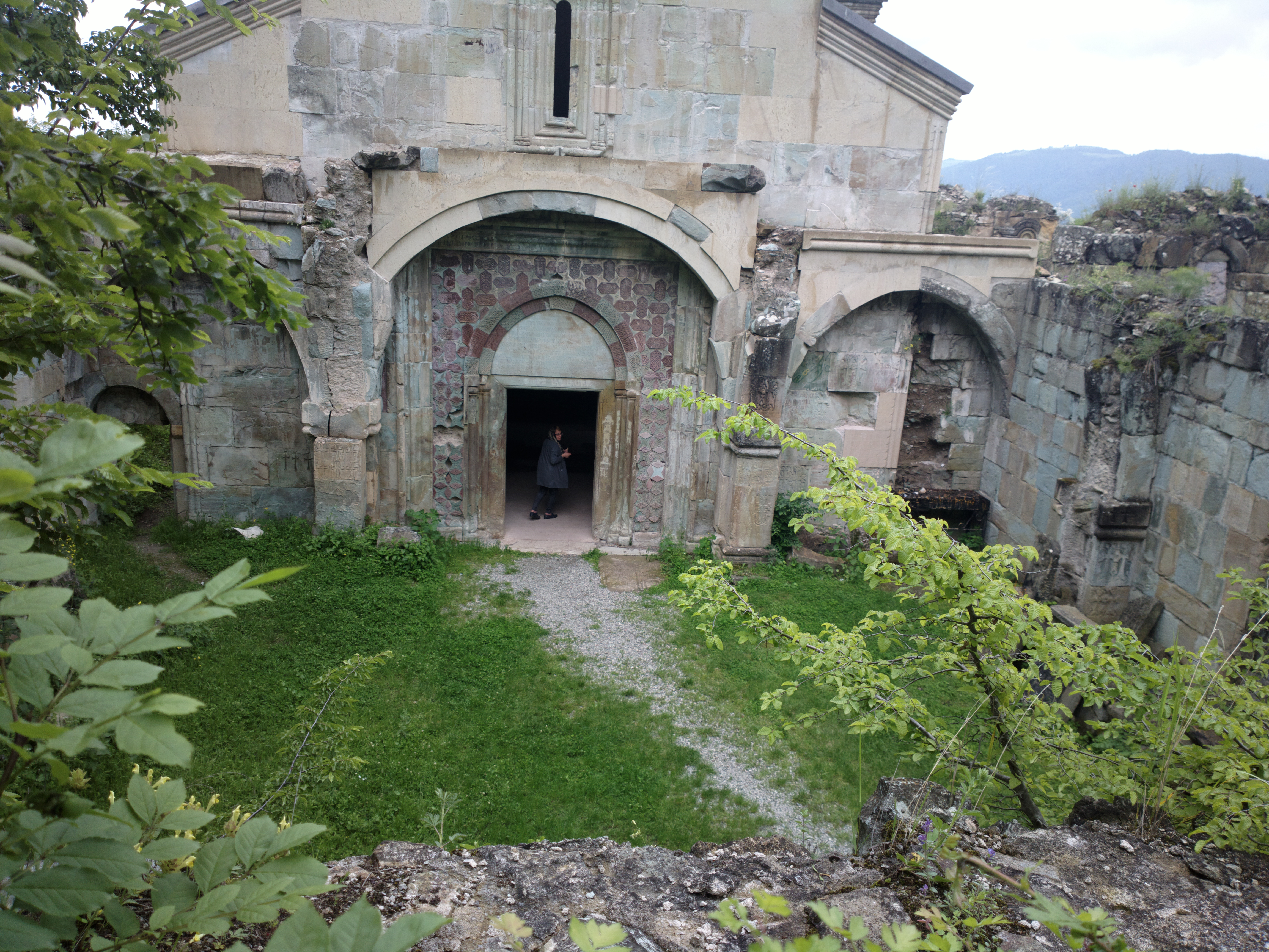 Վանական Համալիր Նոր Վարագավանք (Անապատ) 60/10